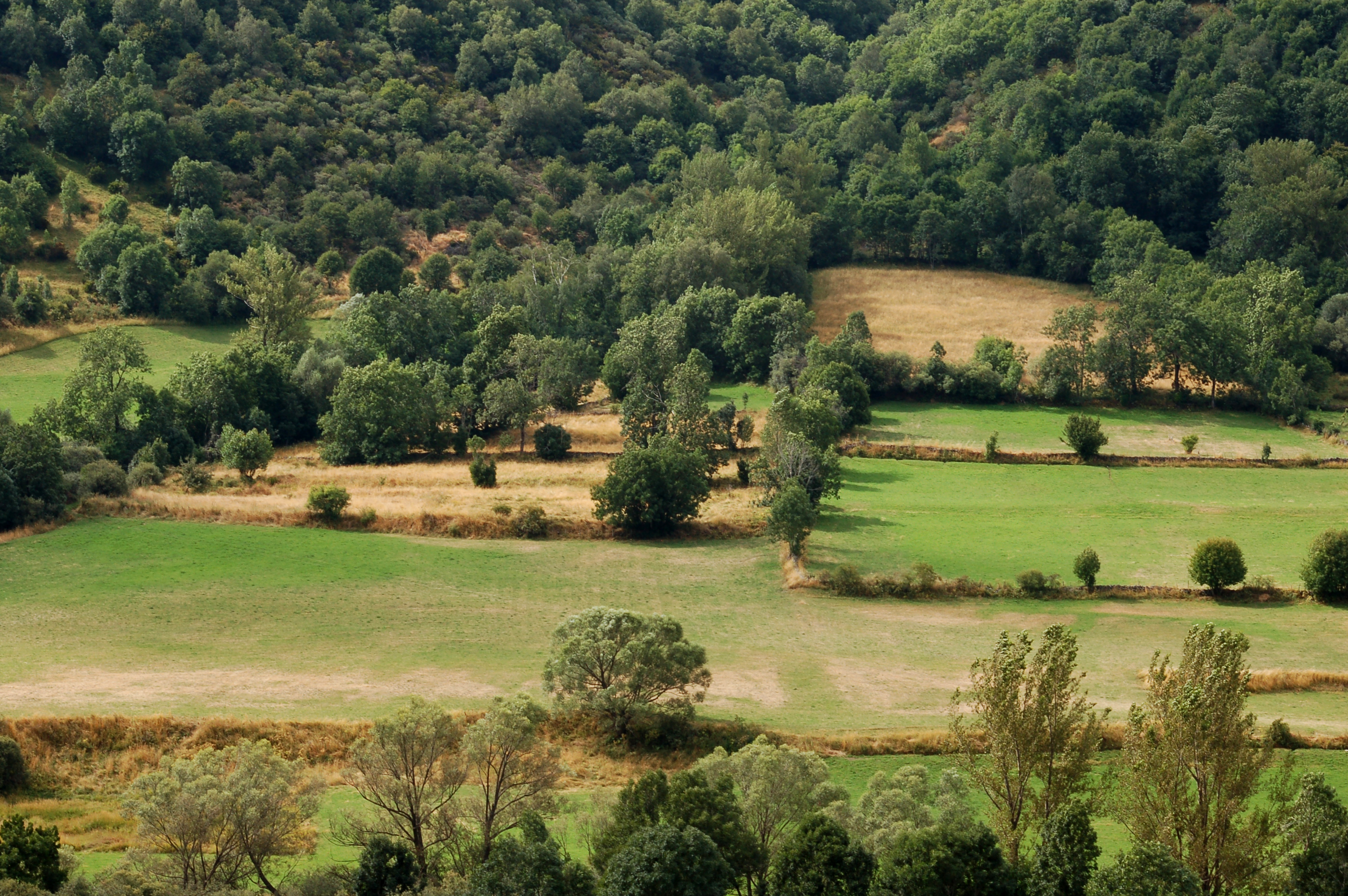 Pastos en el valle de Omaña.